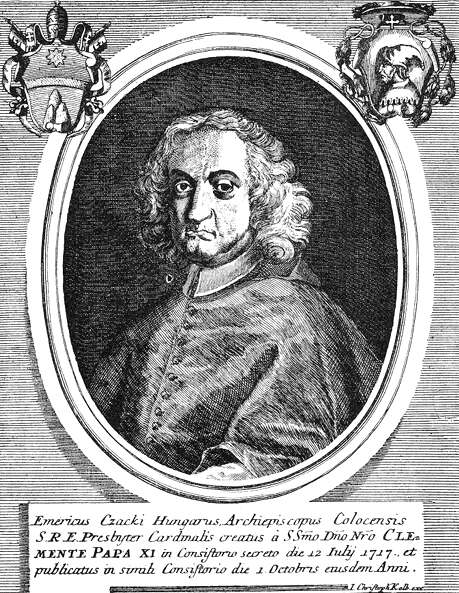 Csáky Imre (1672–1732) kalocsai érsek, bíboros portréja. Korabeli rézmetszet